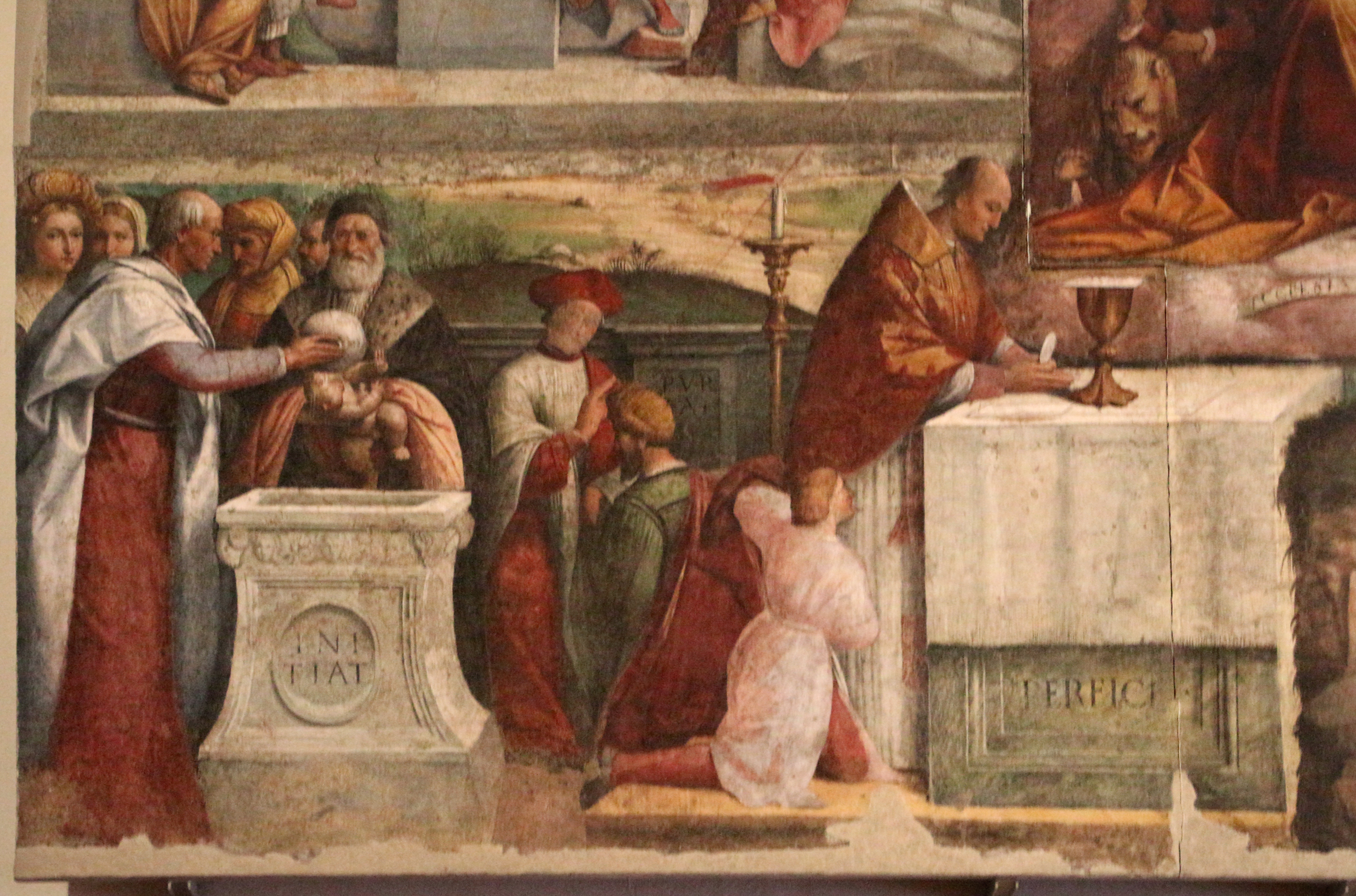 Palazzo dei Diamanti (Ferrara) This is a photo of a monument which is part of cultural heritage of Italy.